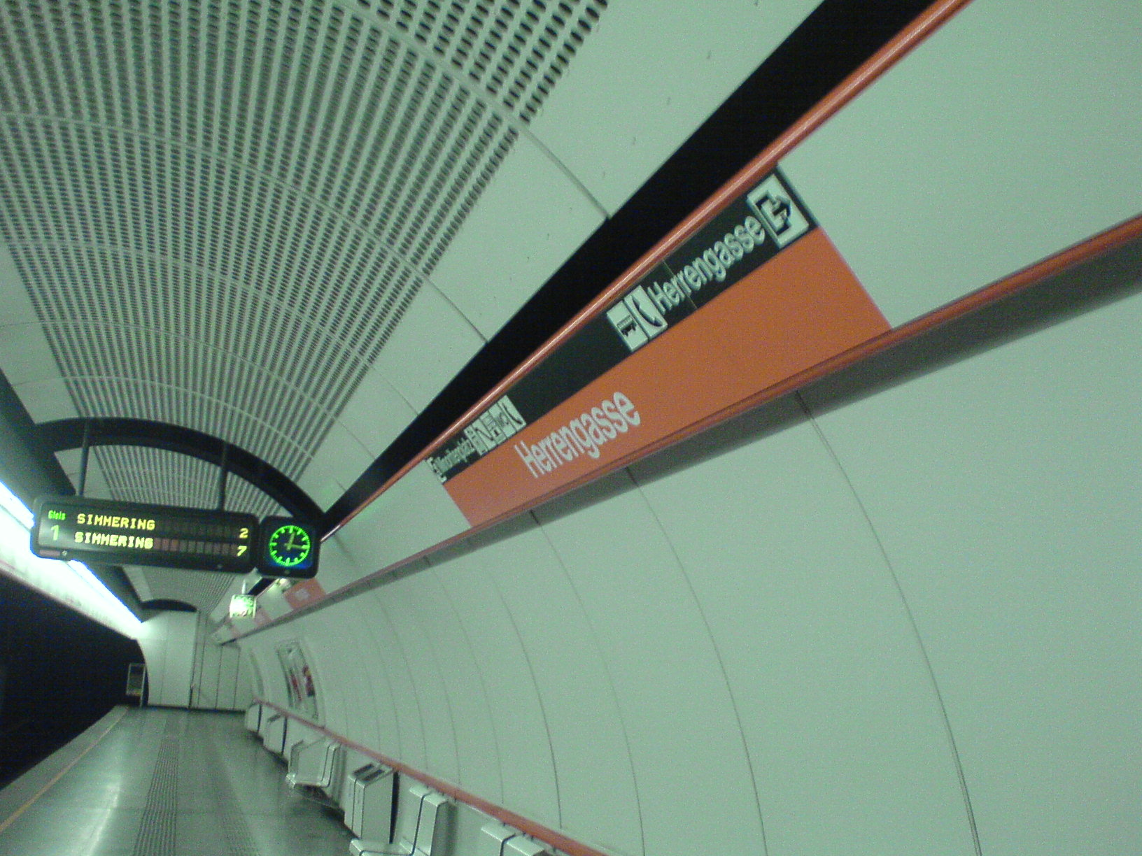 Bahnsteig der Station Herrengasse zur Wiener U-Bahn